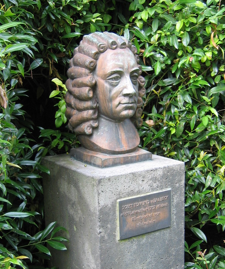 Büste des Jobst Edmund von Brabeck vor Haus Letmathe in Iserlohn (Germany)